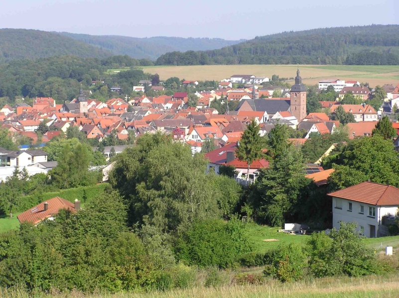 Blick auf Buchen (Odenwald)